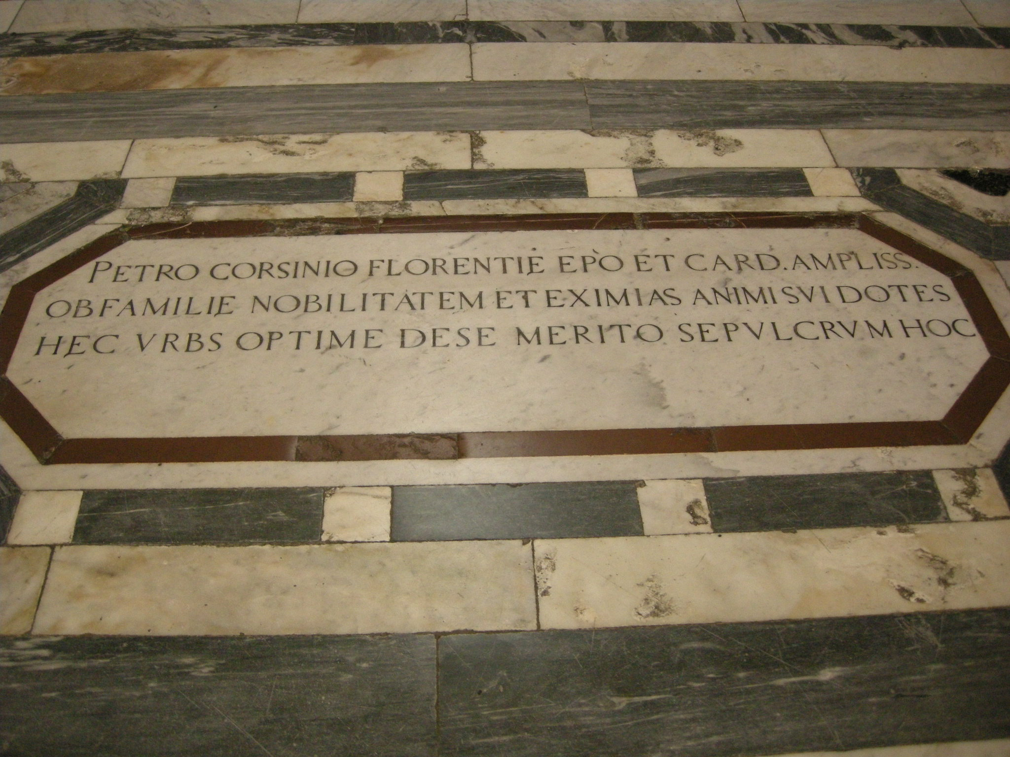 Smf, tomba lapide pietro corsini